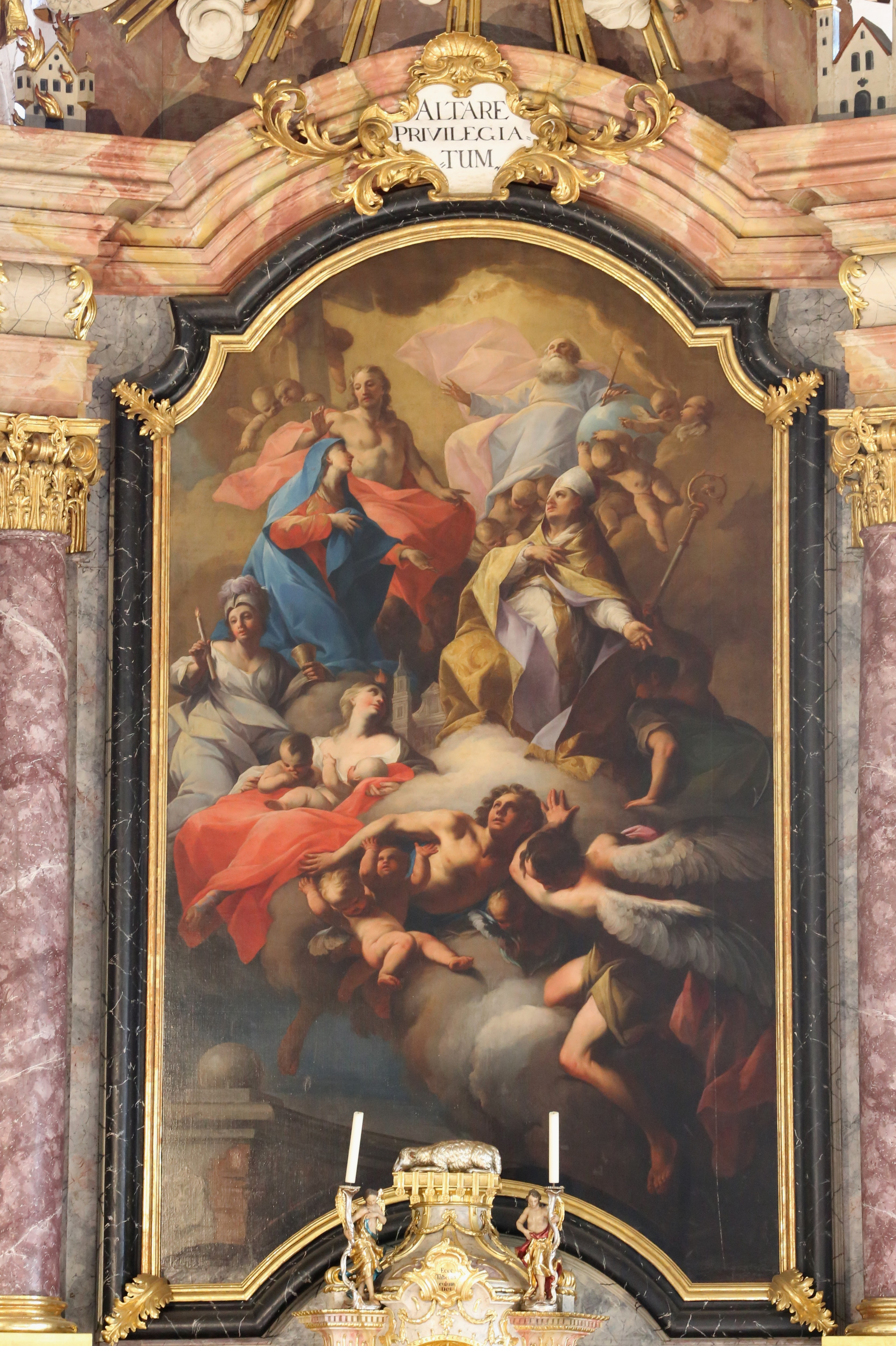 Bienerstraße, Rattenberg; Kath. Pfarrkirche hl. Virgil, Hauptaltar